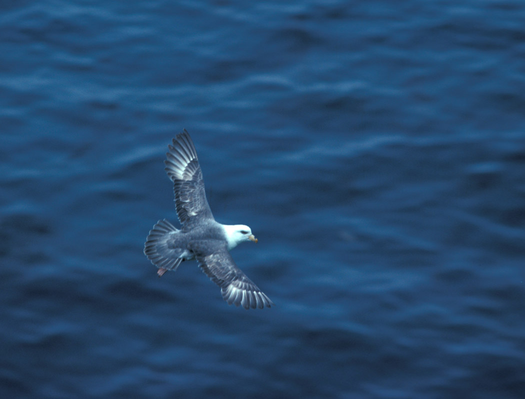 Fulmarus glacialis en vol (Iles Aléoutiennes)